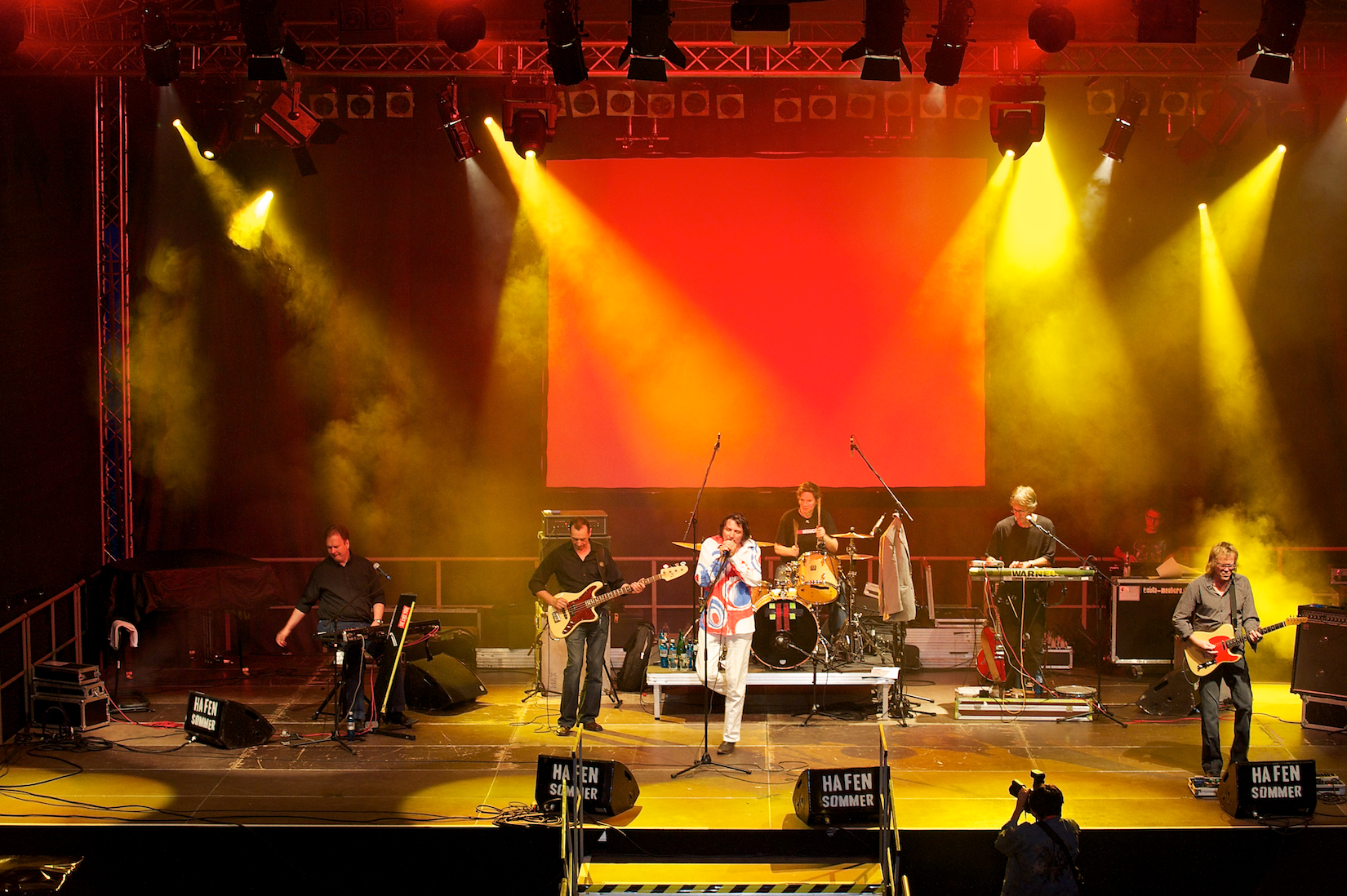 Konzert-Foto von Fehlfarben beim Würzburger Hafensommer am 07.08.2010